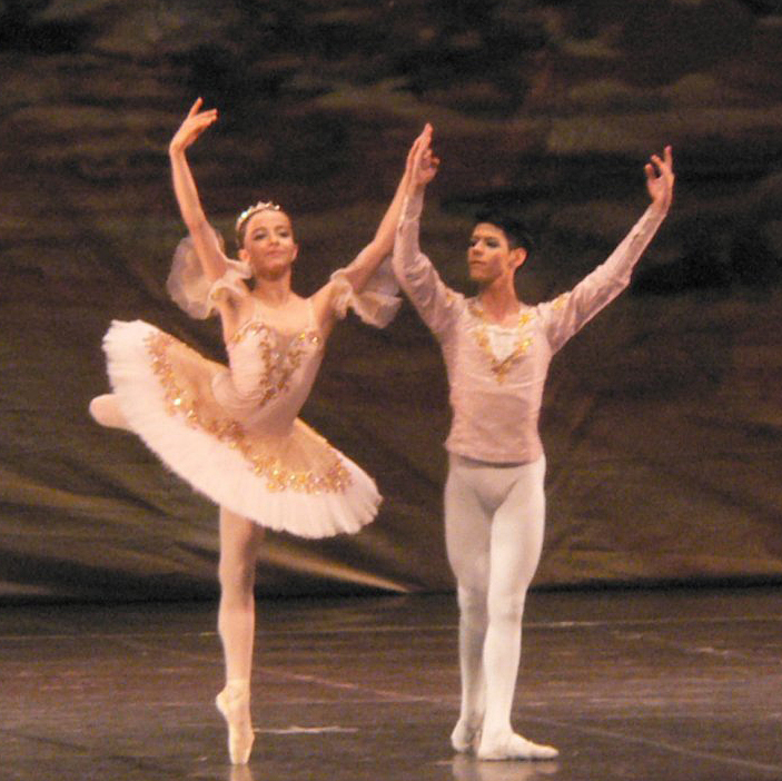 Apresentação do Ballet Bolshoi, no Festival de Dança de Joinville.